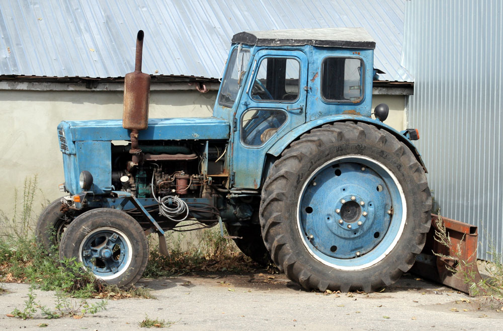 Колёсный трактор в городе Кузнецк Пензенской области